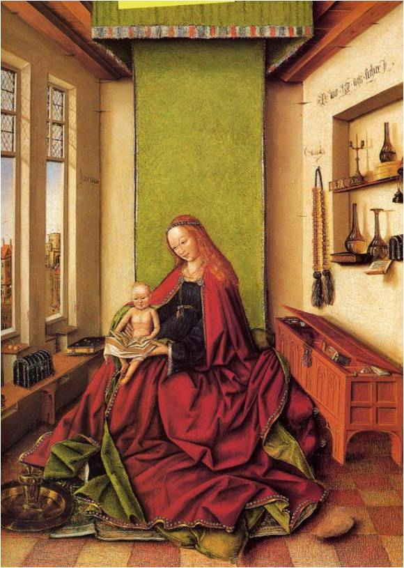 Llit